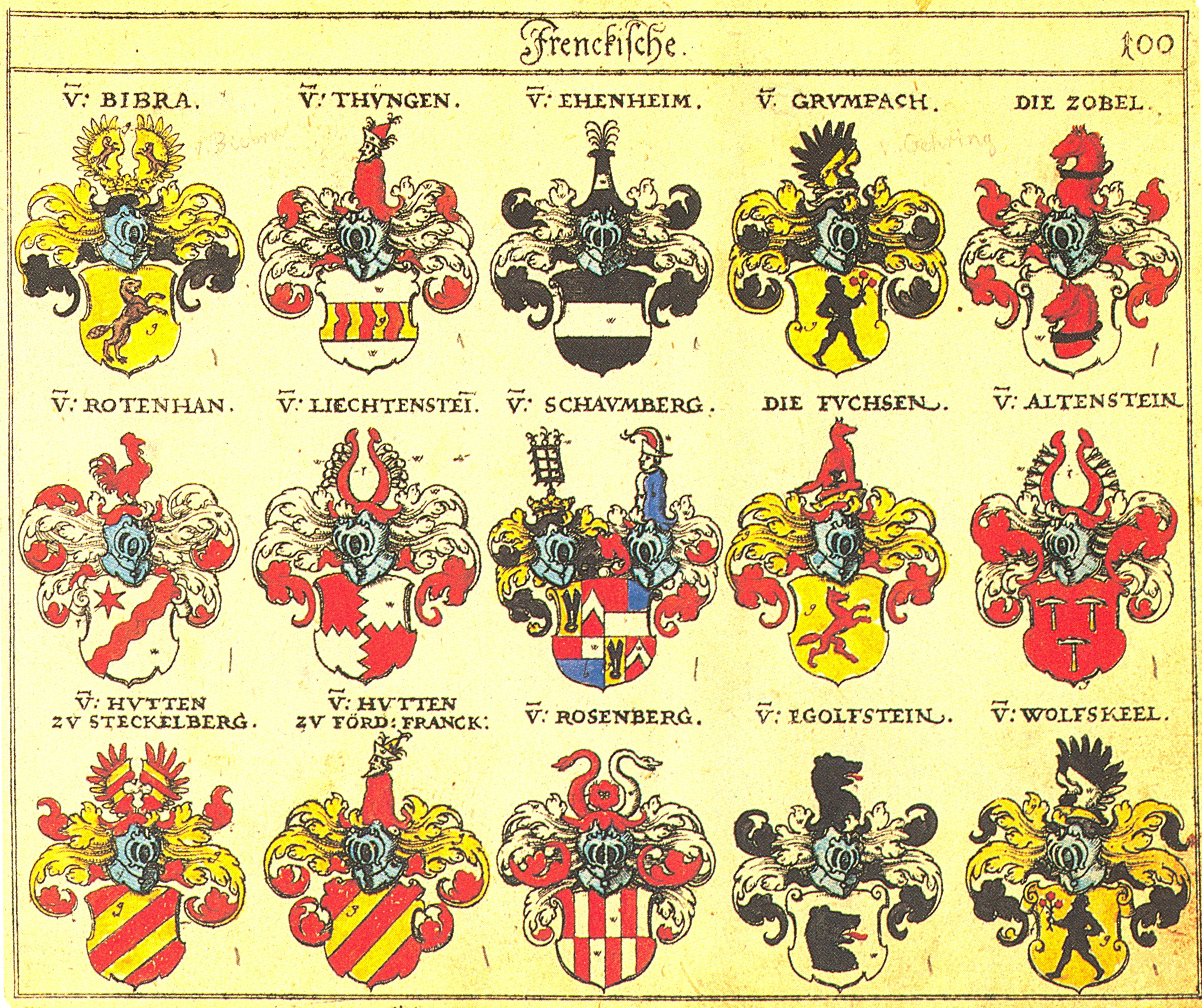 Johann Siebmacher: New Wappenbuch eingescannt aus: Horst Appuhn (Hrsg.), Johann Siebmachers Wappenbuch. Die bibliophilen Taschenbücher 538, 2. verb. Aufl , Dortmund 1989 Fränkische Blatt 100